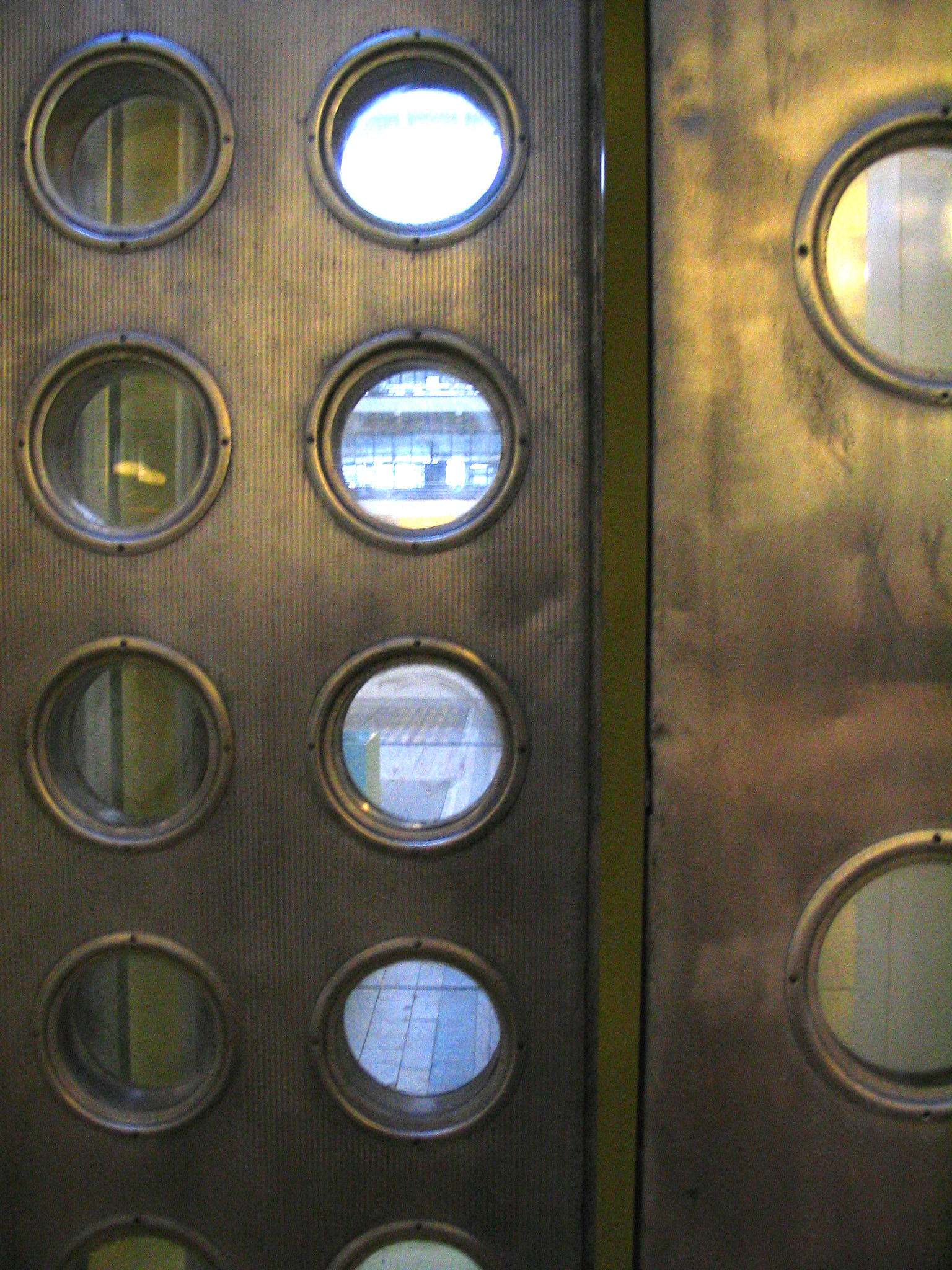 Détail des panneaux de façade de Jean Prouvé